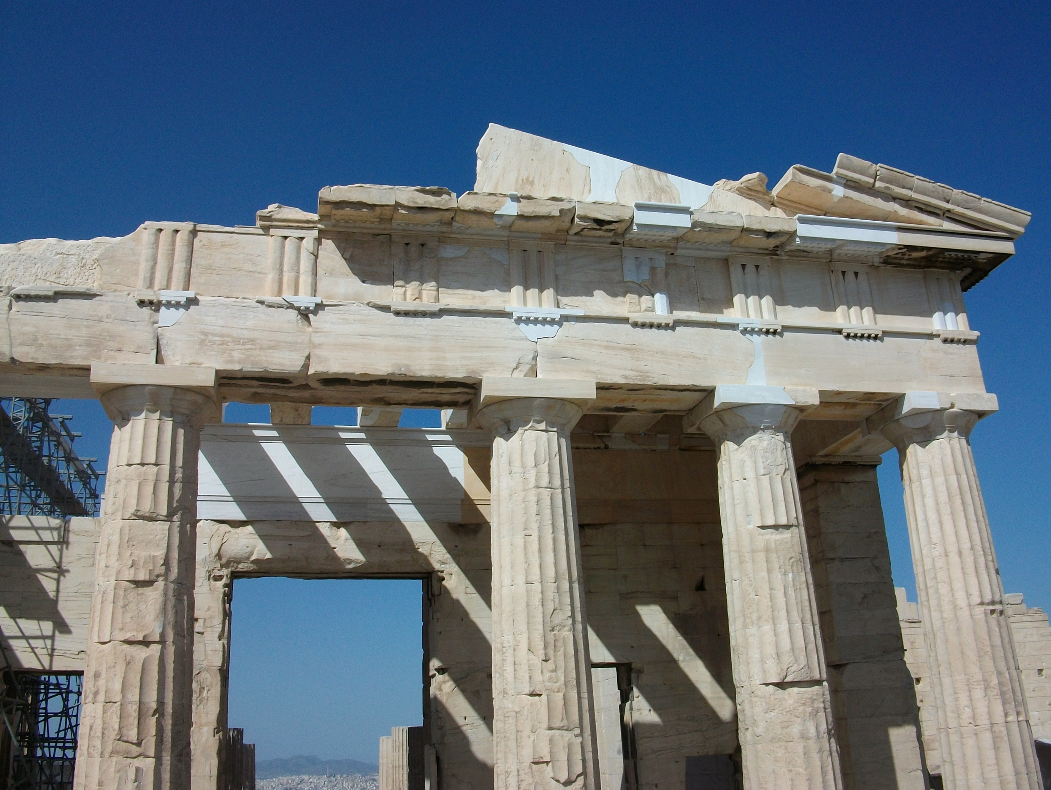 Propileus, Acròpoli d'Atenes.